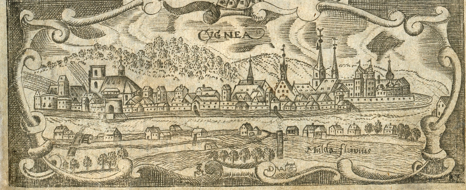 Titelbild der Zwickauer Stadtchonik von Tobias